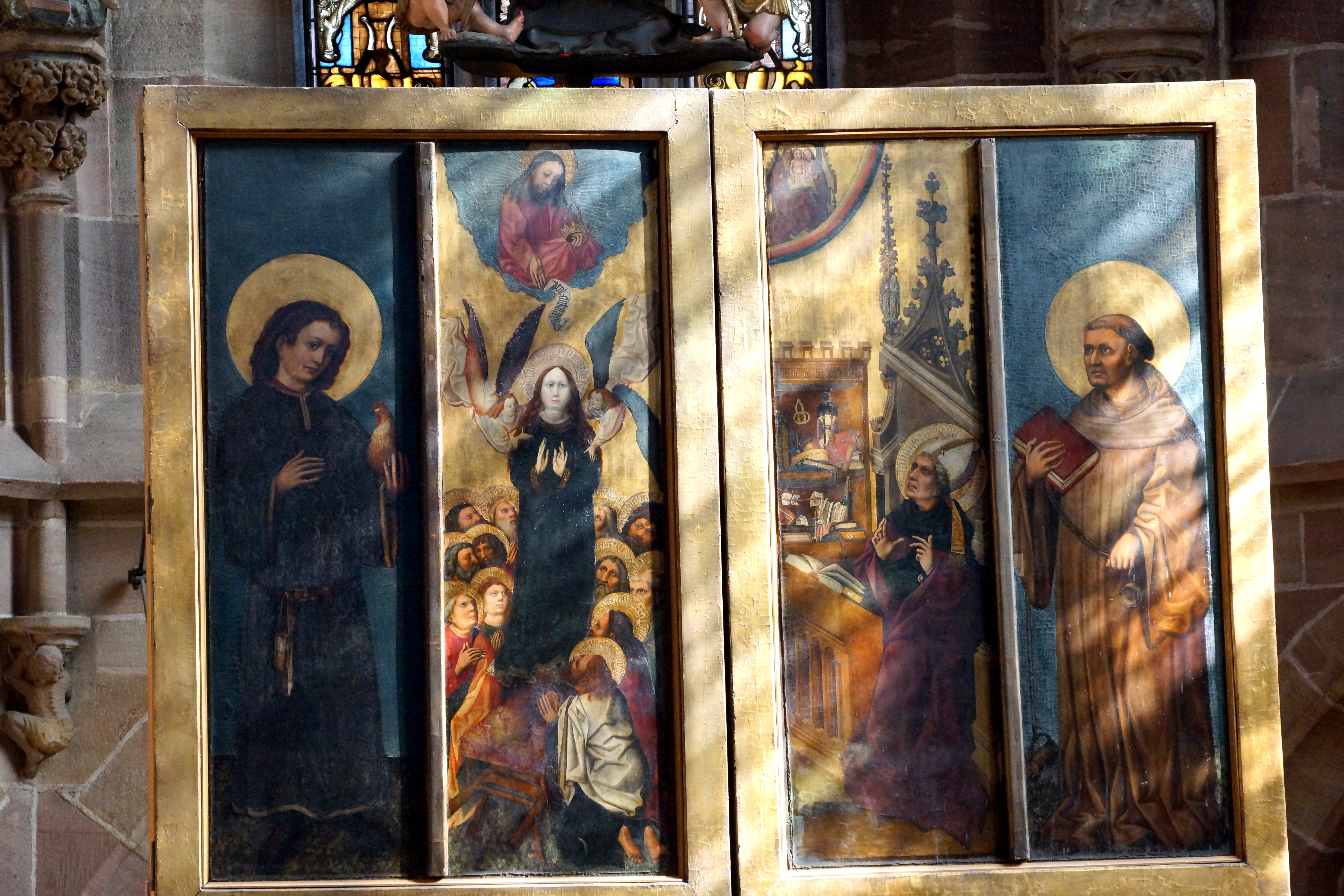 Innenansicht der Frauenkirche zu Nürnberg